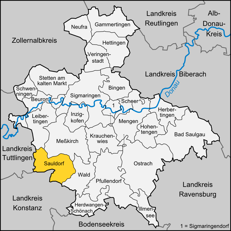 Karte der Gemeinde Sauldorf im Landkreis Sigmaringen